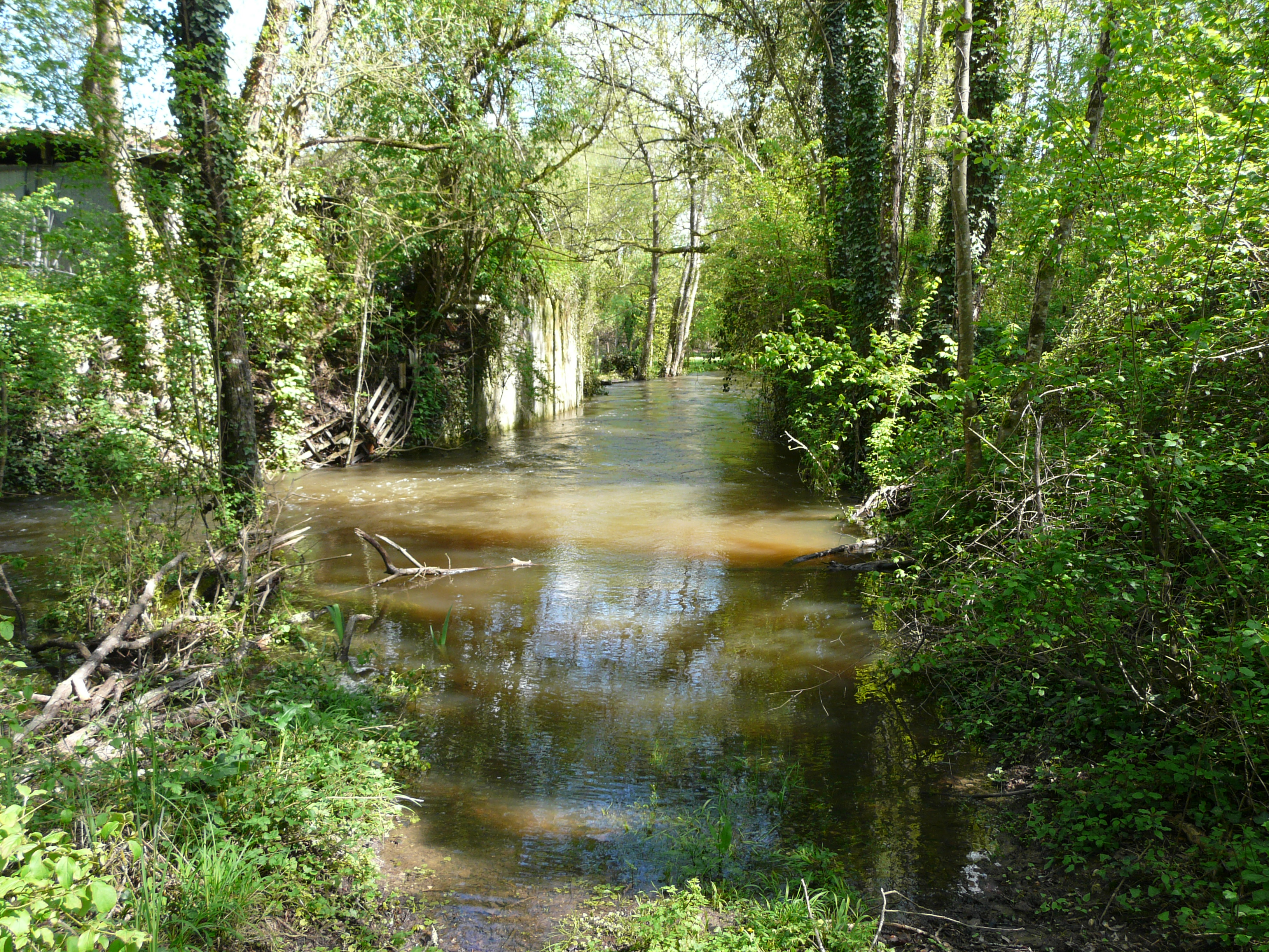 La Beauronne en aval du pont de la route départementale 3 marque la limite entre Saint-Louis-en-l'Isle (à gauche) et Saint-Front-de-Pradoux (à droite) ; Dordogne, France. Photo prise après une période prolongée de pluies intenses.